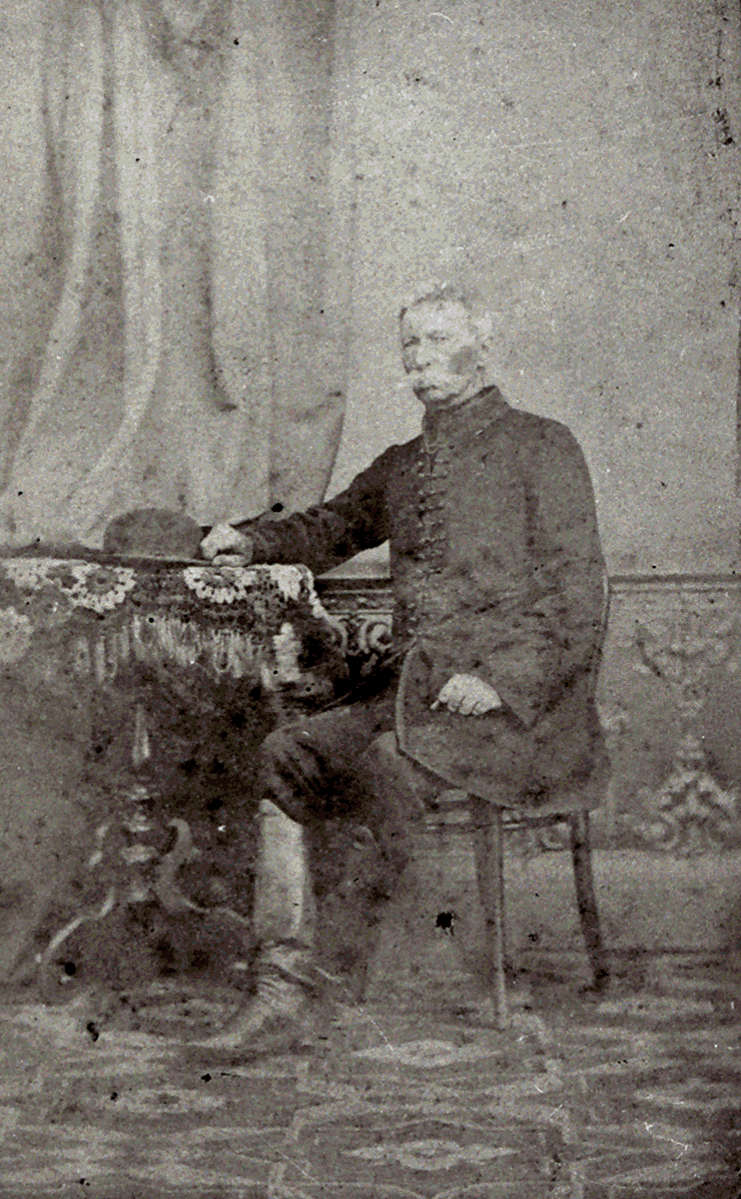 miskei és monostori Thassy Mihály (*Nemesvid, 1804. március 28.–†Alsólendva, 1898. május 21.) földbirtokos. Neje, hottói Nagy Magdolna